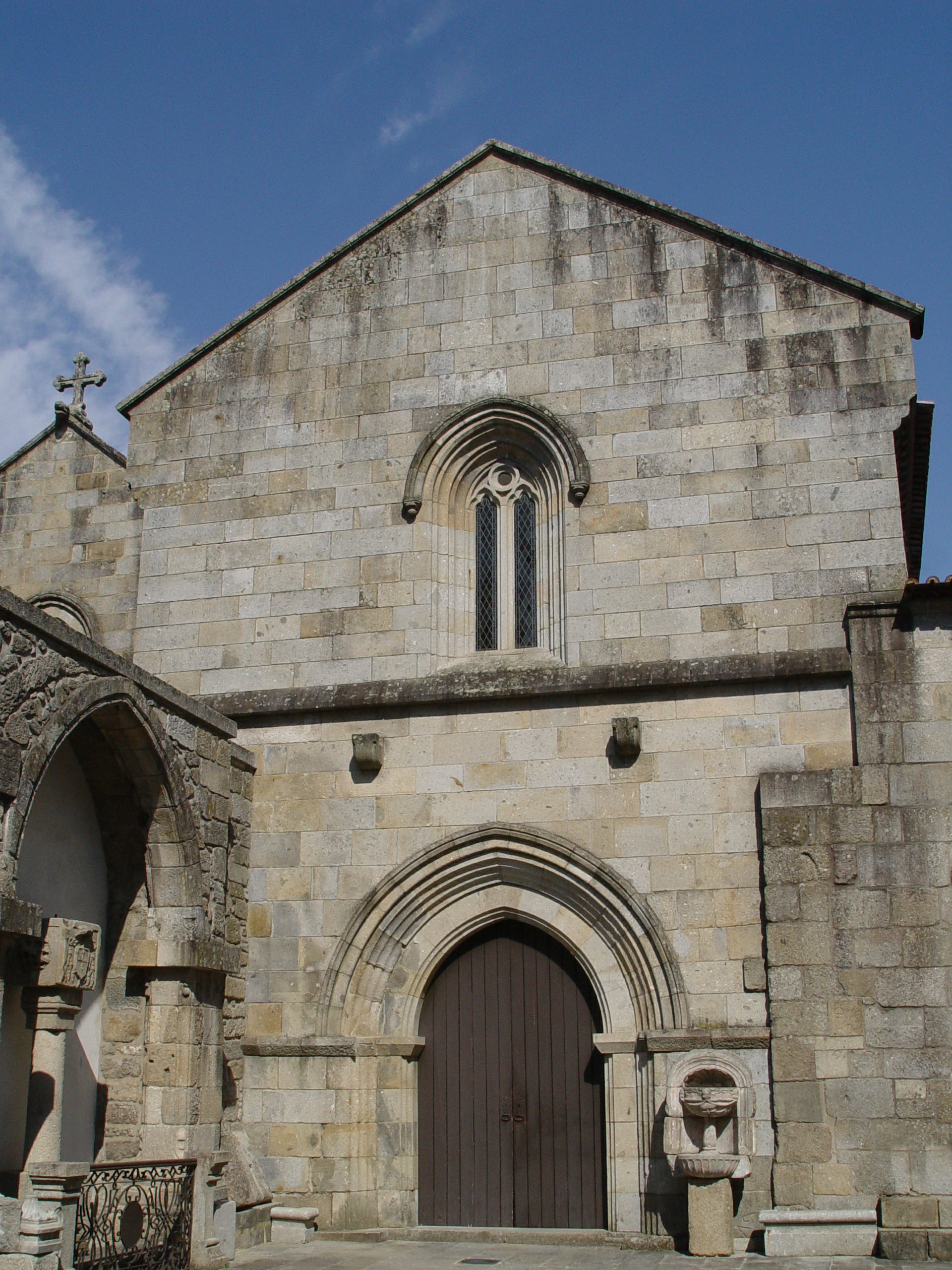 Foto: Jose Goncalves A Capela de S. Geraldo na Sé de Braga.